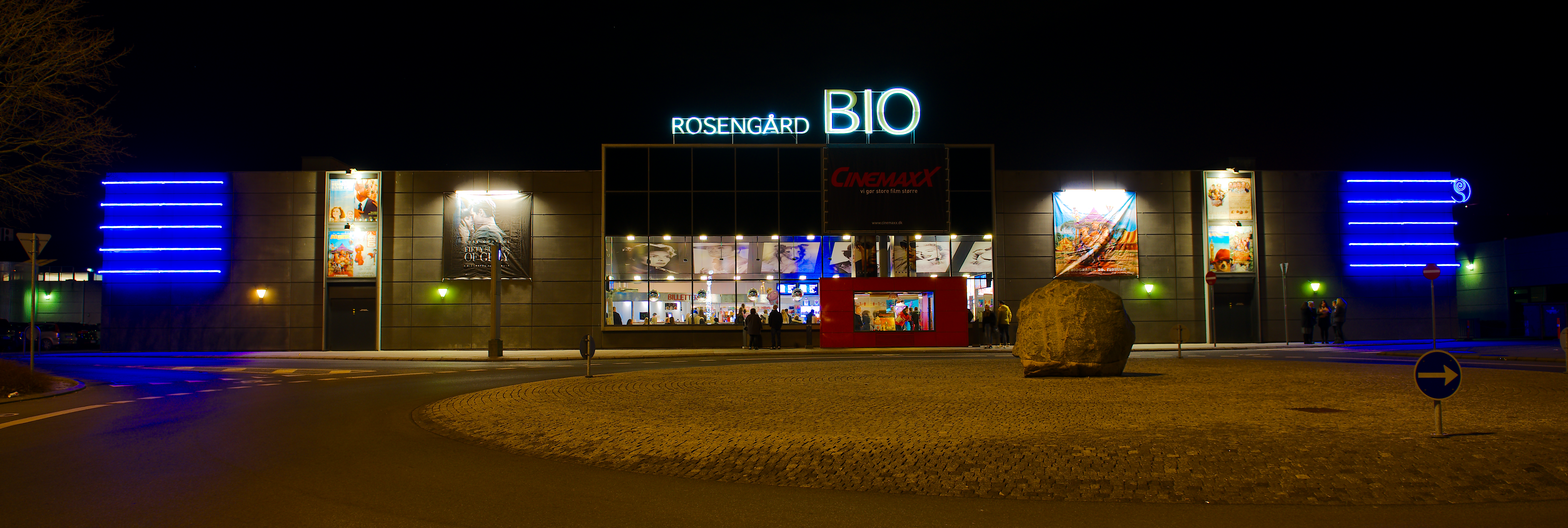 Cinemaxx i Odense, om aftenen